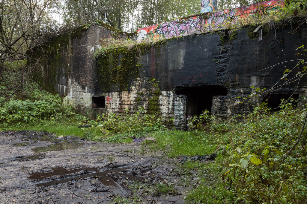 Peeter Suure Merekindluse rannakaitsepatarei nr. 4 komandopunkti fasaad